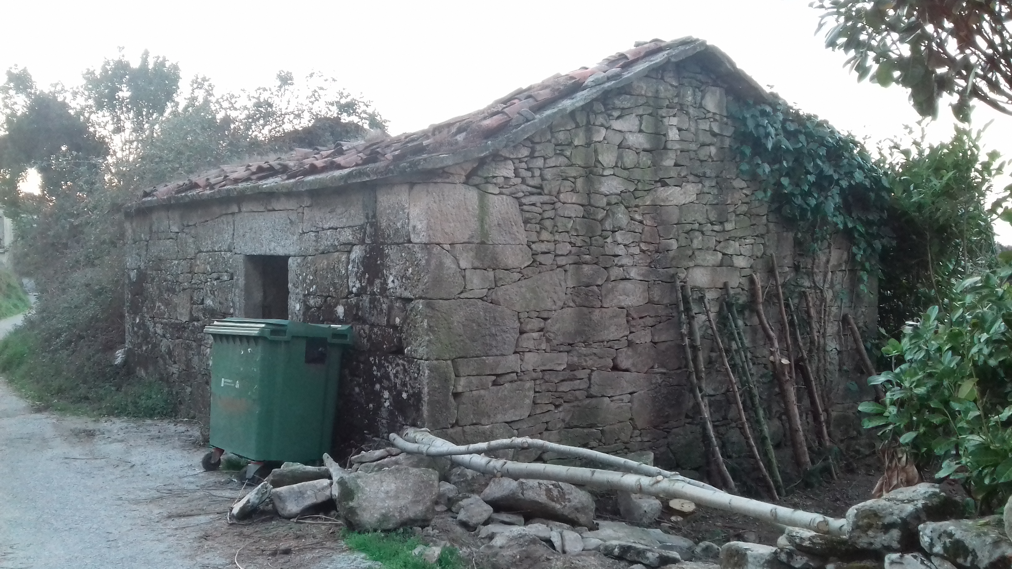 Forno de Mizoite de Abaixo